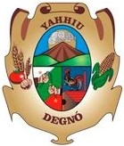 Escudo de Cortazar, Guanajuato